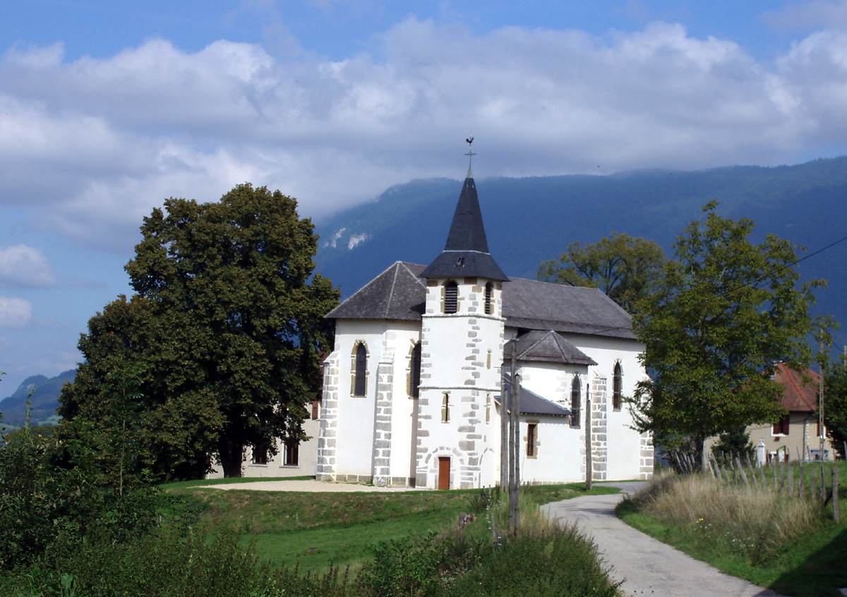 eglise de Saint-Pierre d'Alvey en Avant-pays Savoyard